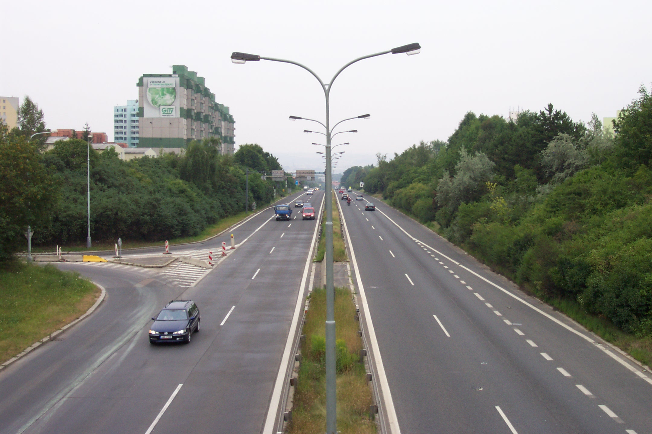 Severojižní magistrála a rychlostní silnice R8 v Praze, v tomto úseku Liberecká ulice na hranici Libně a Střížkova, pohled z mostu Vysočanské ulice